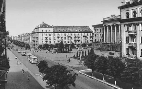 Voli avenue